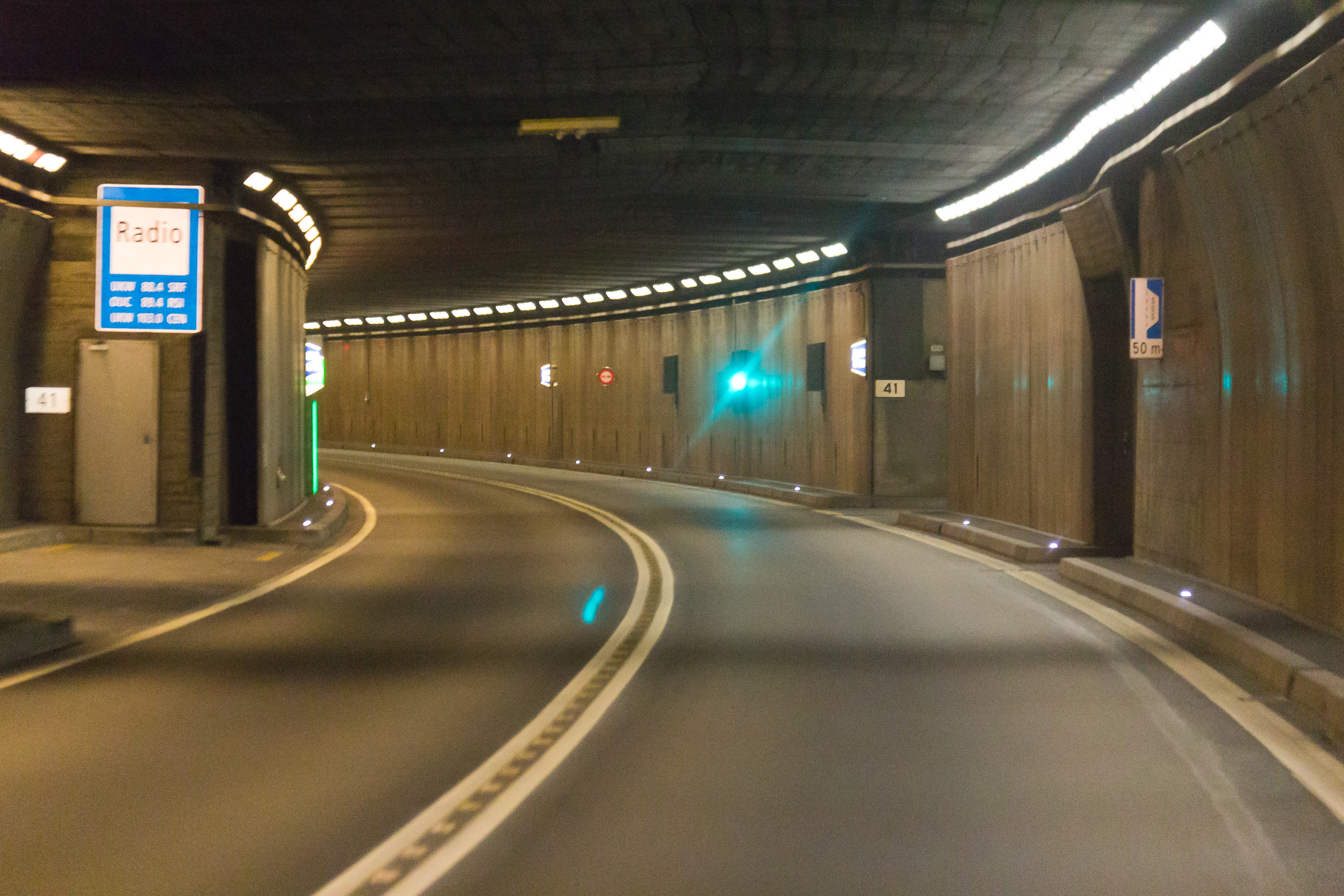 Gotthard-Strassentunnel in einer Nord-Süd-Befahrung Foto: Im Tunnel ein Hinweisschild auf die Radiofrequenzen des Tunnelradios